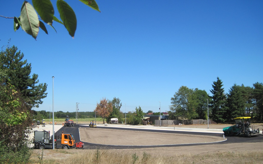 Neuer "Busbahnhof" der IGS Sassenburg im Bau auf dem Gelände der ehemaligen & abgebrochenen Grund- bzw. Förderschule